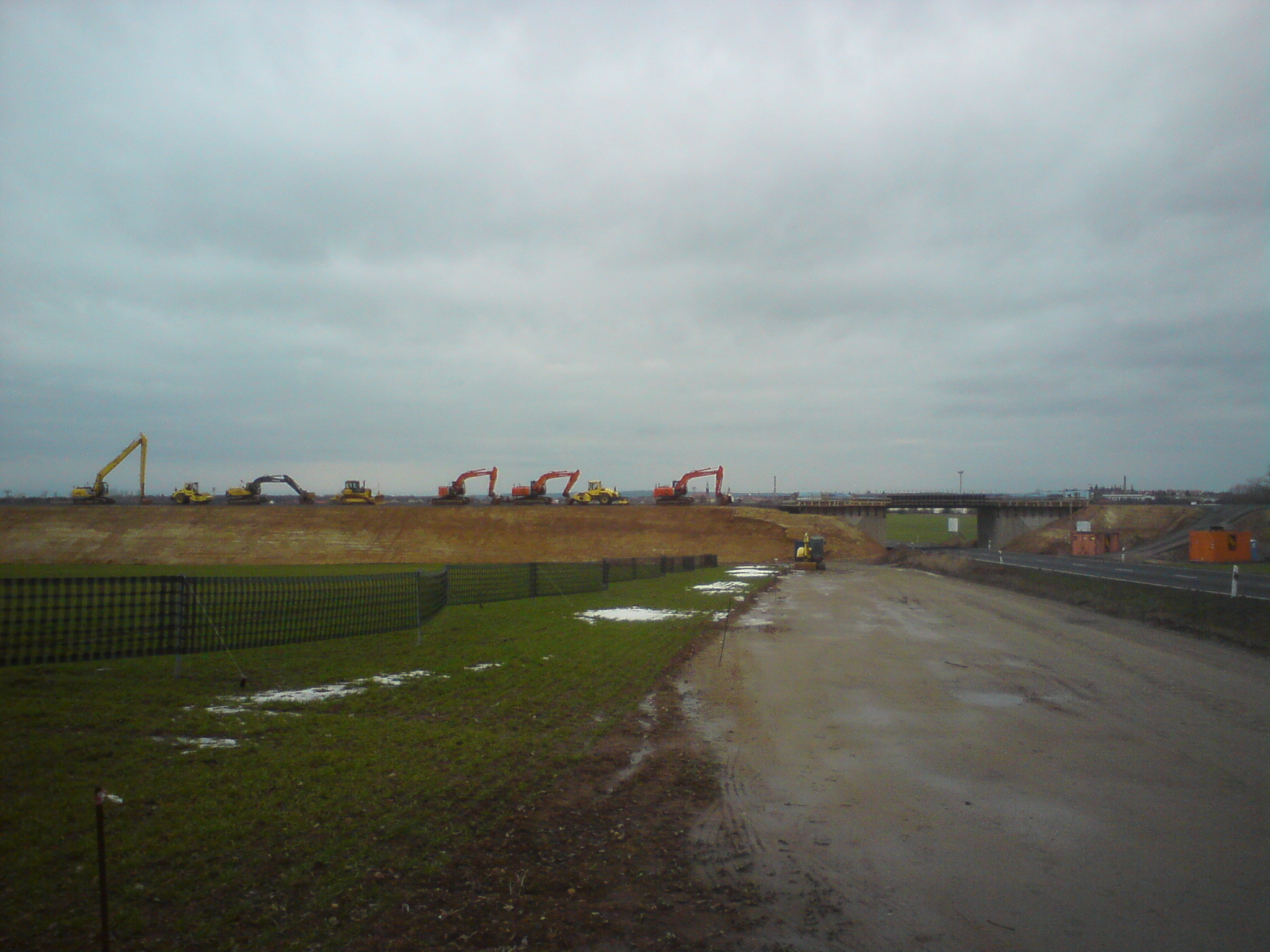 Bauarbeiten an der "Verbindungskurve Weißig–Böhla" - Brücke über die B101 zwischen Großenhain und Priestewitz